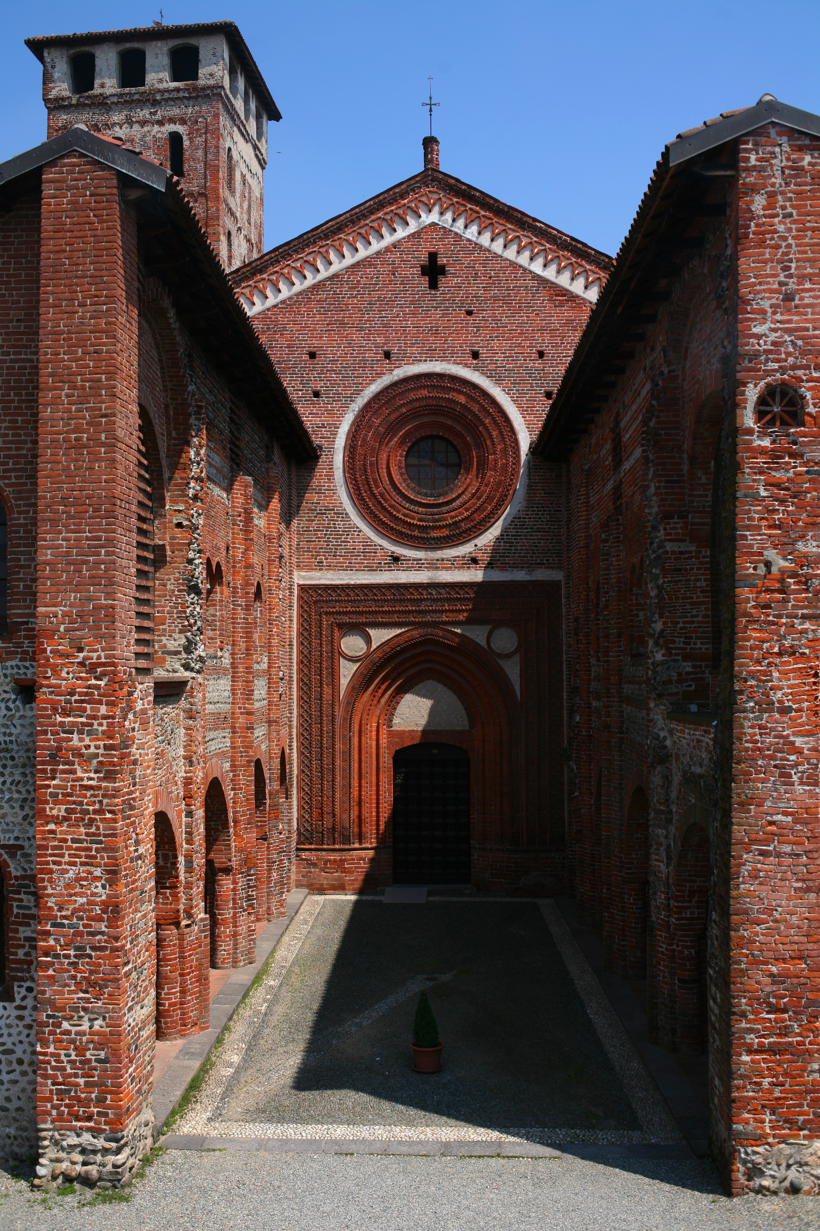 Abbazia di San Nazaro e Celso facciata